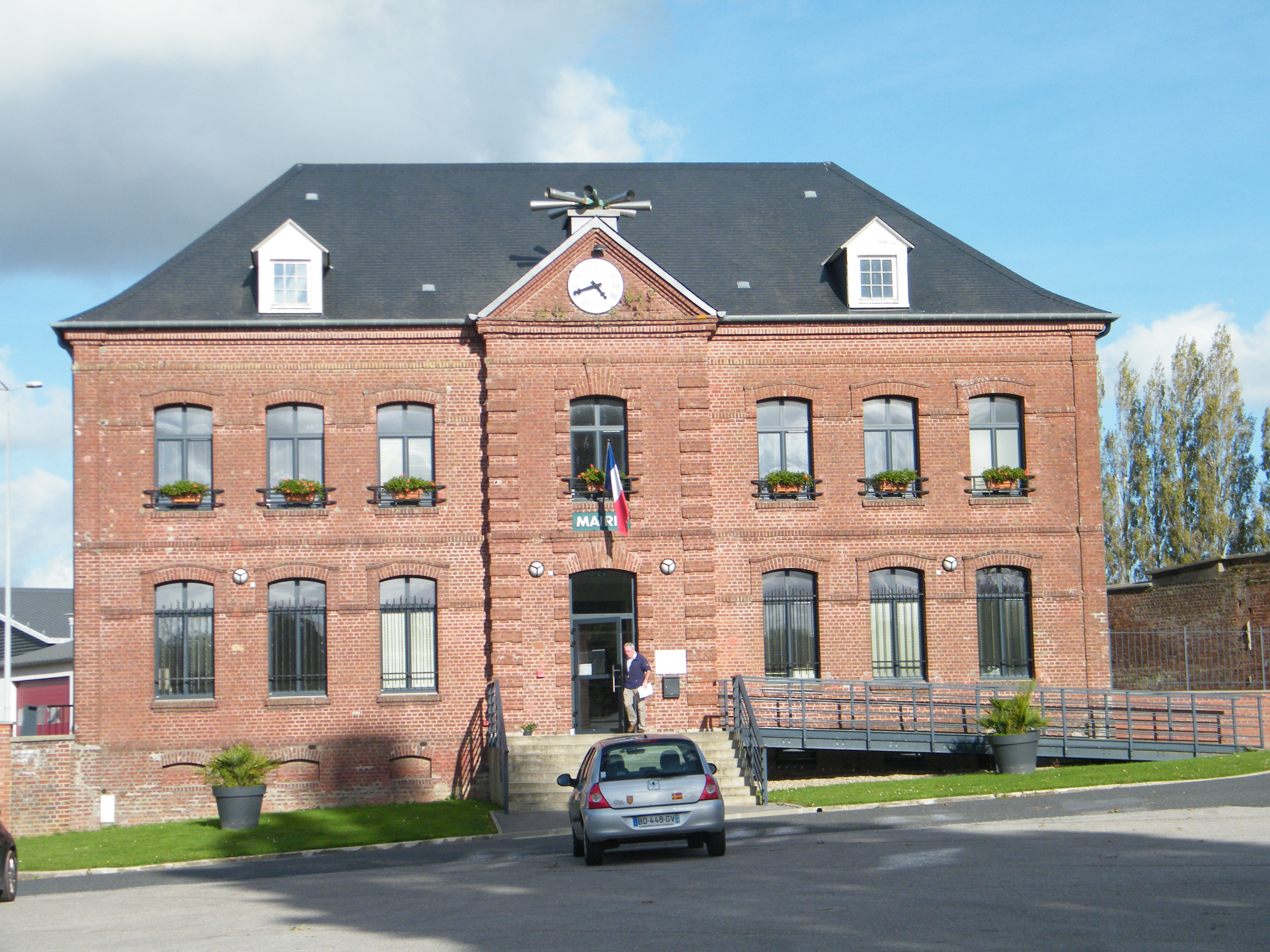 Woincourt, Somme, Fr, mairie.